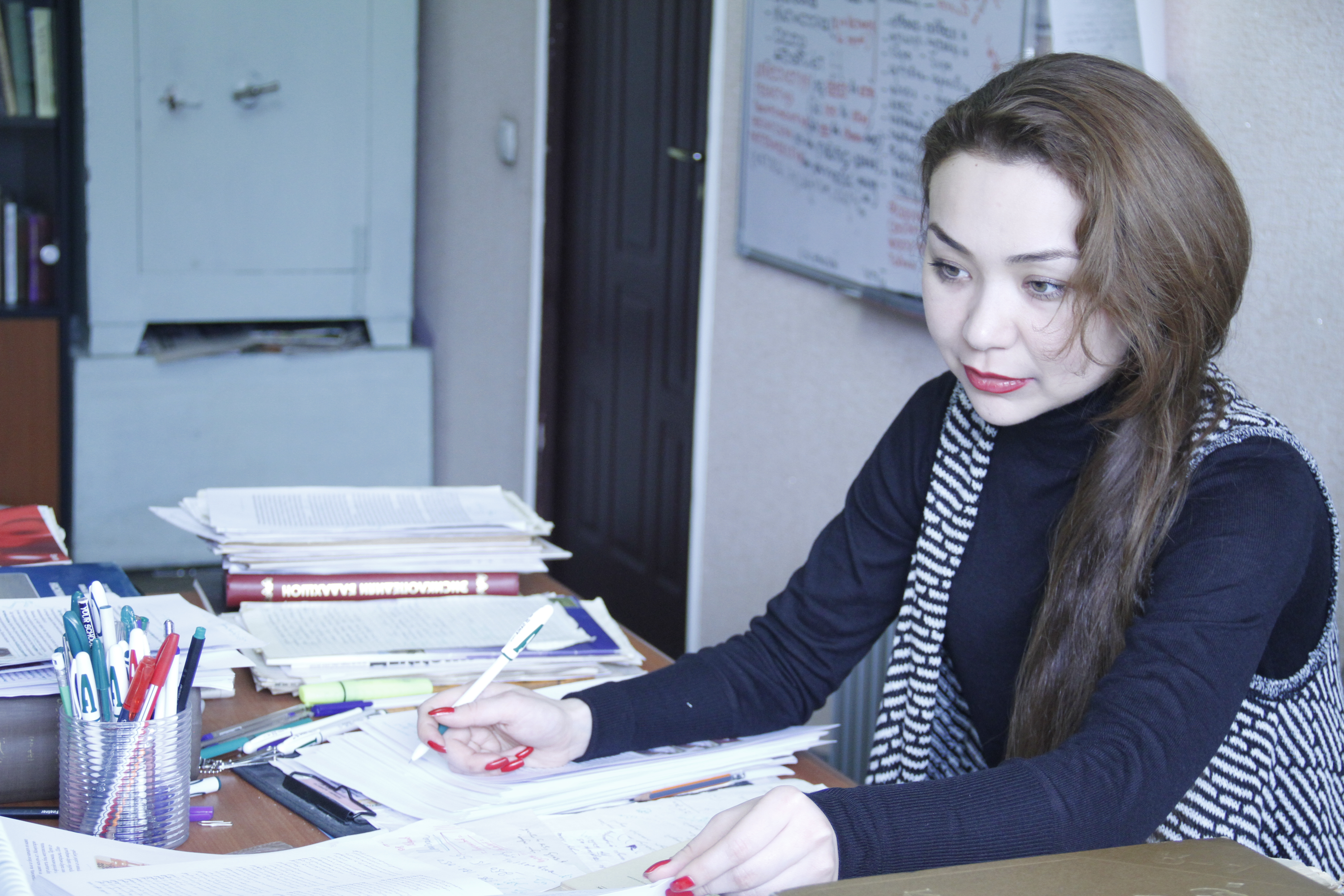 Тоҷикӣ: Тахмина Ниёзова